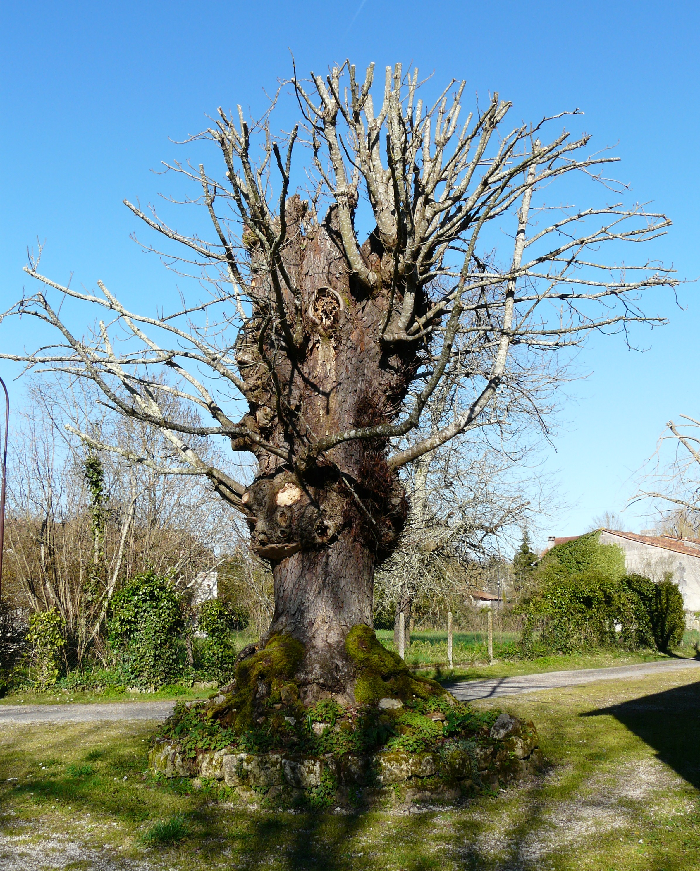 Arbre à Ponteyraud, Dordogne, France.